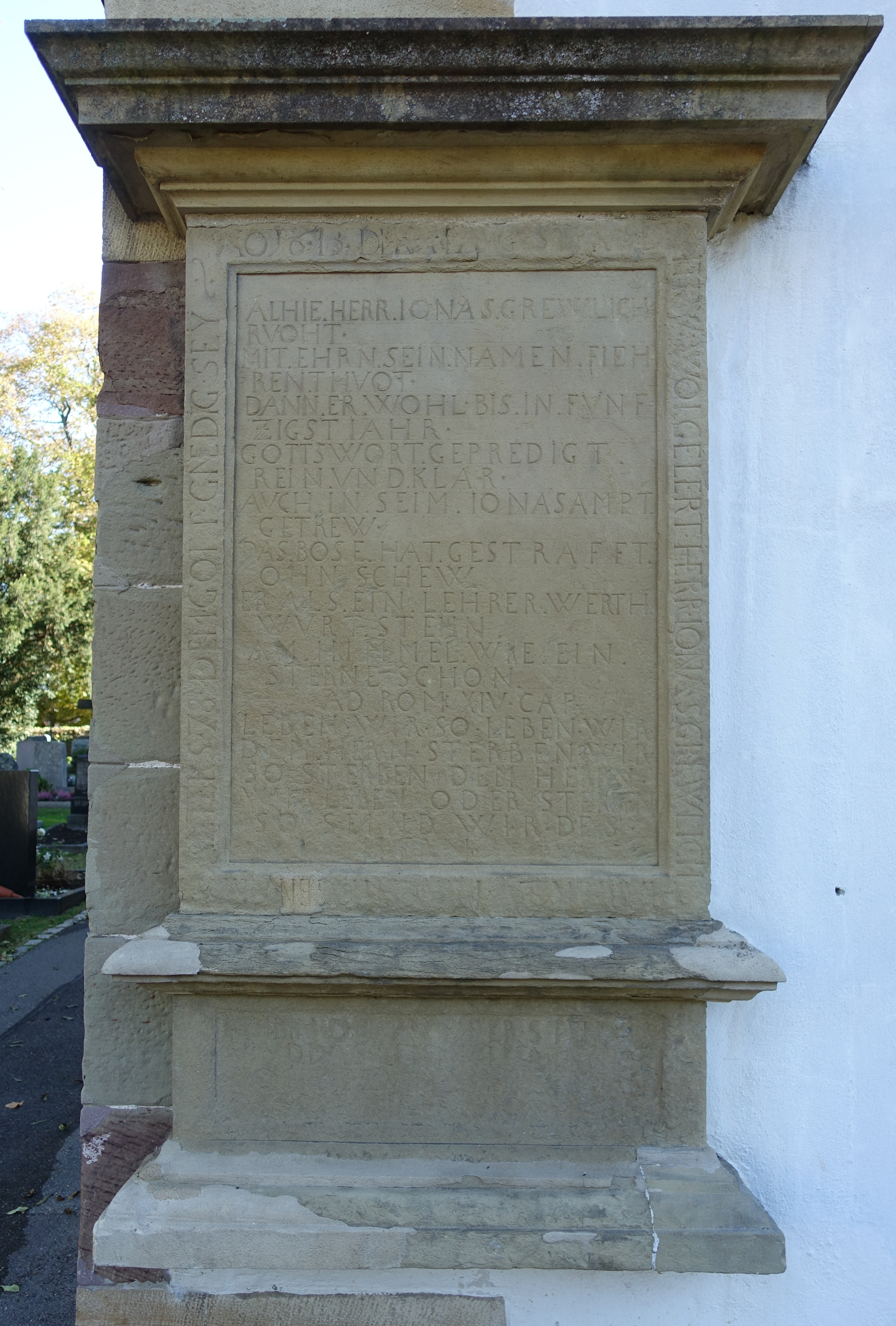 Epitaph an der Westseite der Uffkirche auf dem Uff-Kirchhof in Stuttgart-Bad Cannstatt für den Cannstatter Pfarrer Jonas Greulich (1535–1613).